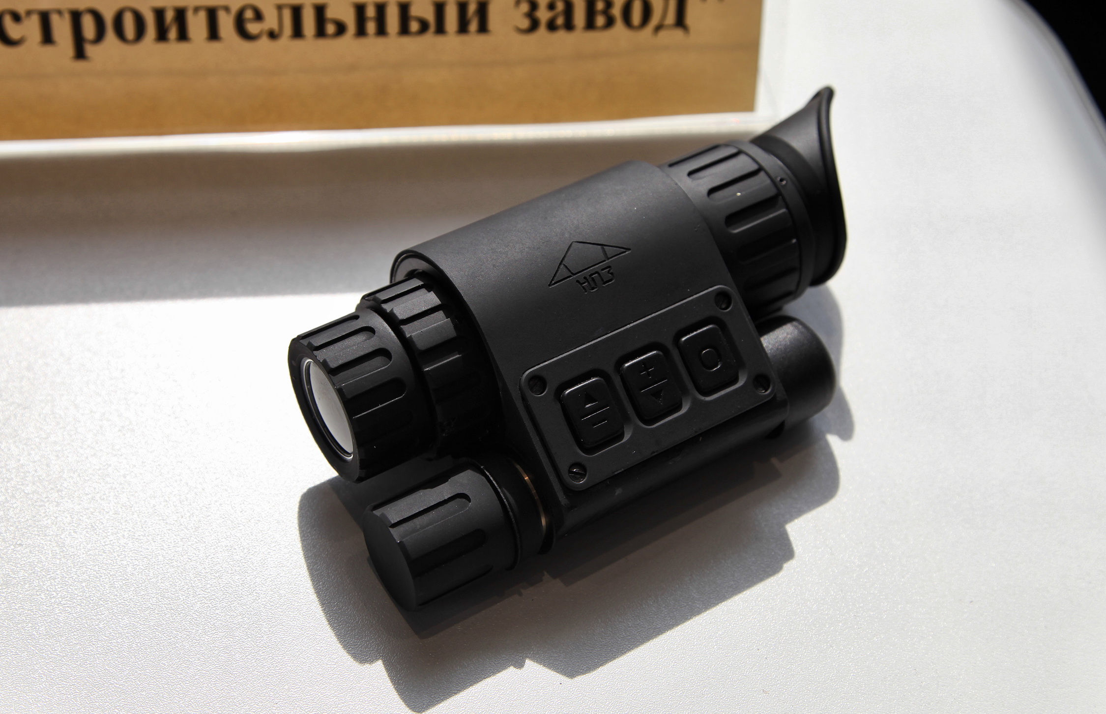 Монокуляр тепловизионный ПТ2